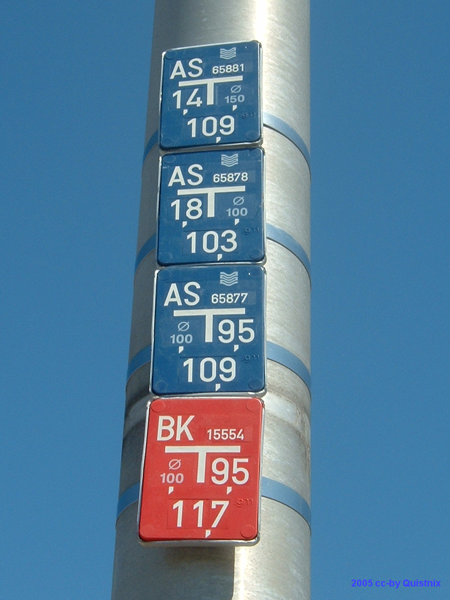 "Positieaanduiding afsluiters (AS) en brandkraan (BK). Afstanden in meters tot het bord, in de richting ten opzichte van de toeschouwer die naar het bord kijkt.